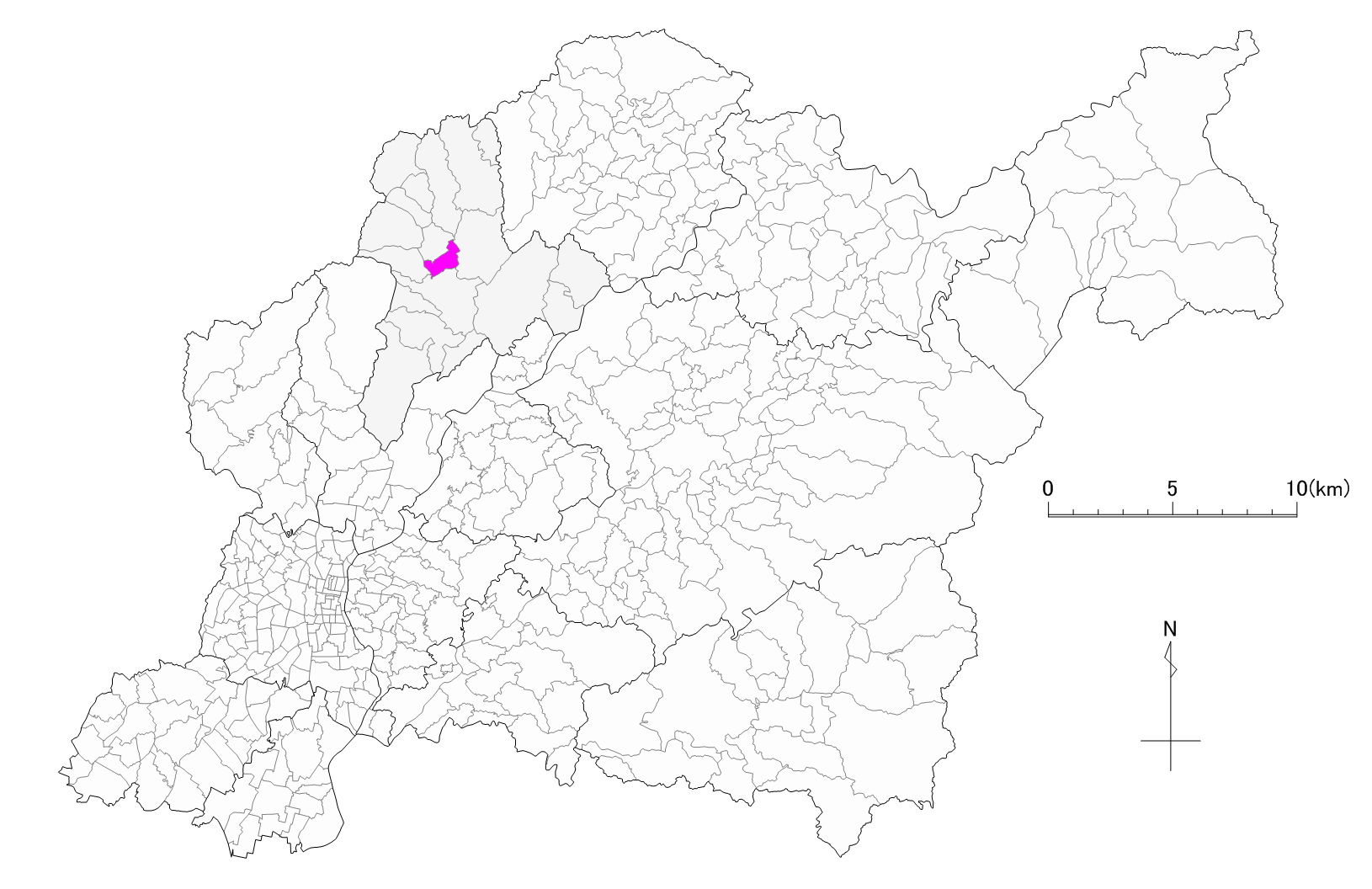 豊田市石飛町位置図